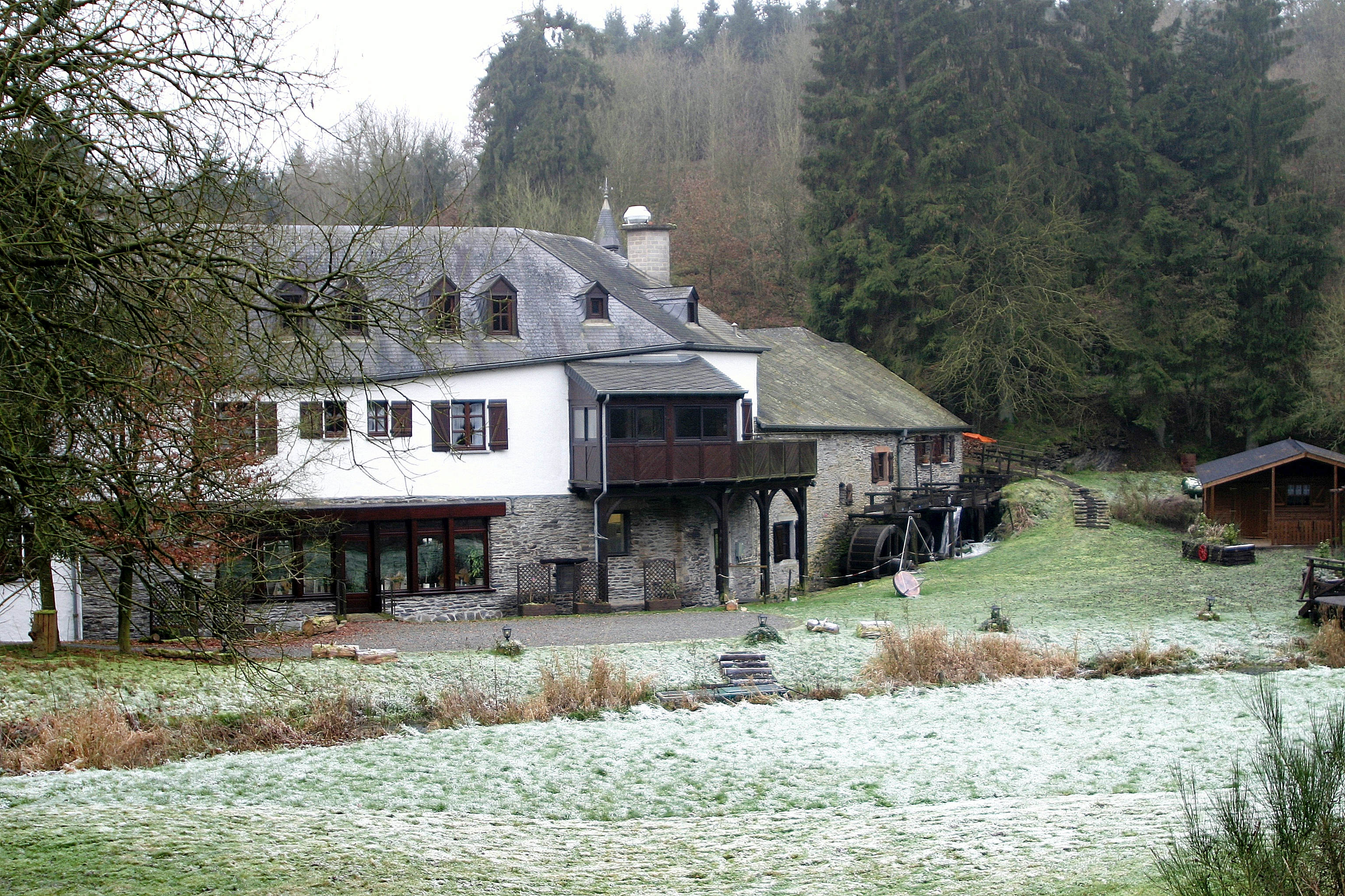 D'Mille vun Aasselbuer (2006)